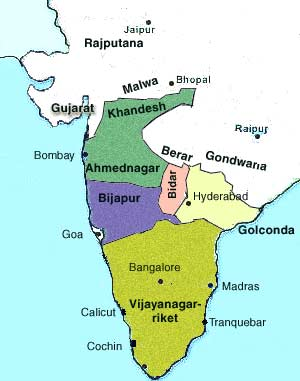 Förbättrad karta över södra Indien 1500, egentillv.